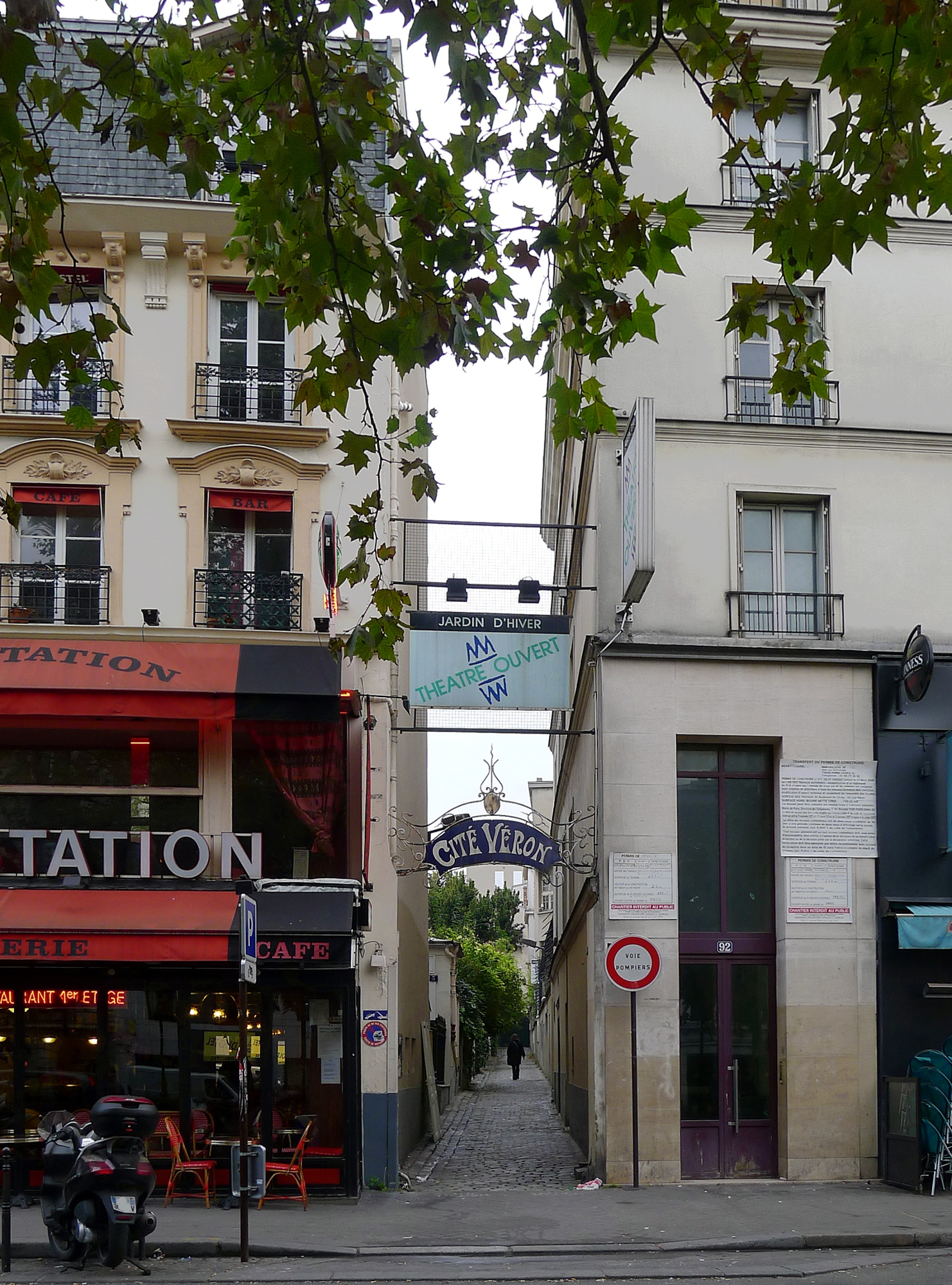 Cité Véron - Paris XVIII